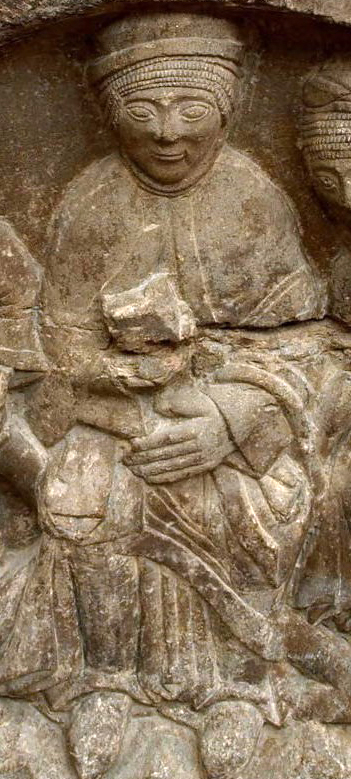 Posible retrato de la condesa Sancha de Aragón en un detalle de su sarcófago.